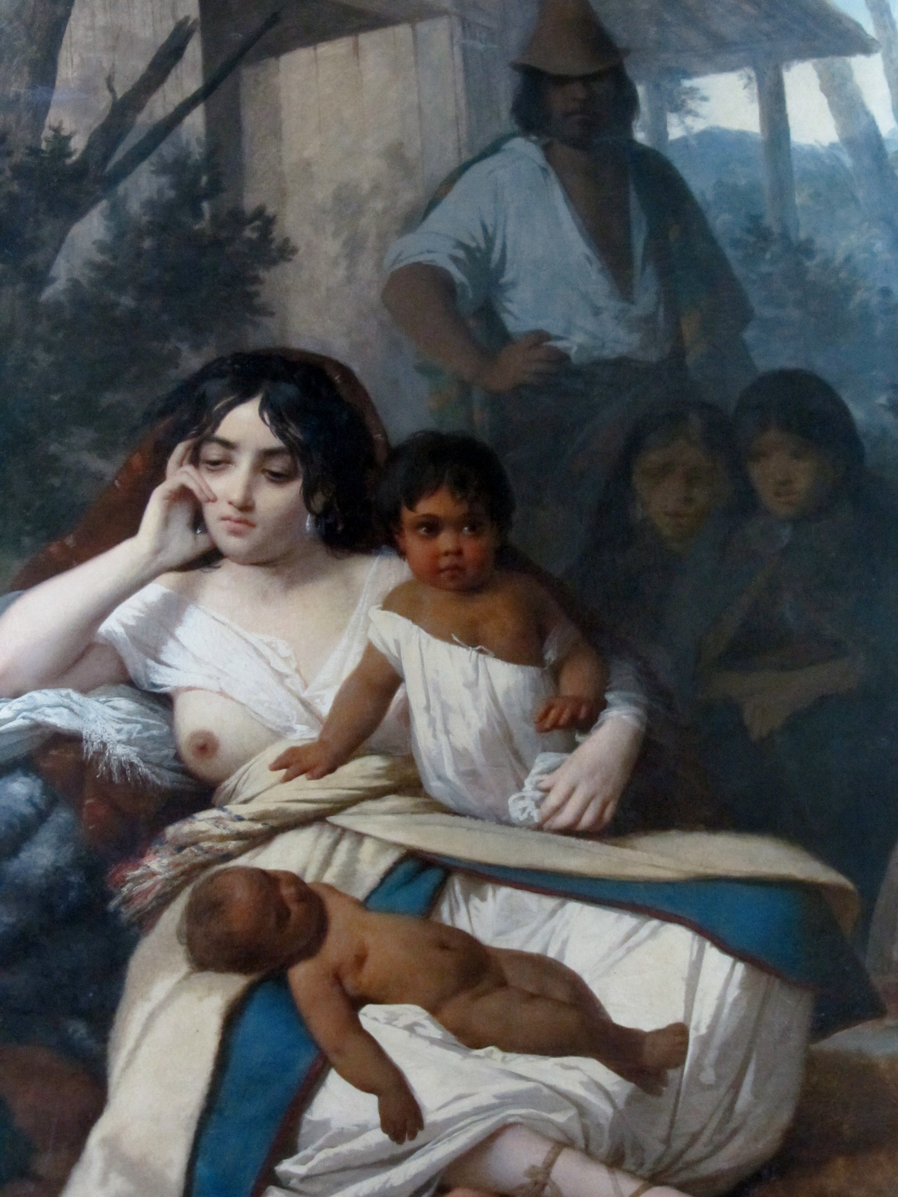 Elisa Bravo Jaramillo iba en el bergantín el Joven Daniel, que había zarpado de Valparaíso el 23 de julio rumbo a Valdivia y que naufragó a la altura de la desembocadura del río Toltén, en la playa de Puancho, costa de Cautín, zona del lago Budi. Sucedió en la noche del 31 de julio al 1 de agosto de 1849; culparon a los mapuches de haber raptado a Elisa, que habría sobrevivido al naugragio y pasado a ser mujer del cacique Kurín o Curín. La leyenda dice que los supervivientes levantaron un campamento en la playa, pero que pronto fueron matados por los indios. Según algunos historiadores modernos, como Sergio Villalobos, Premio Nacional de Historia (Chile), en realidad, no hay pruebas de que hubiera supervivientes ni de que Elisa no hubiera perecido y estuviera efectivamente cautiva en la Araucanía (véase Vida fronteriza en la Araucanía; el fragmento sobre el naufragio puede consultarse en Google Books. Monvoisin pintó otro cuadro sobre el tema: El naufragio del 'Joven Daniel'.